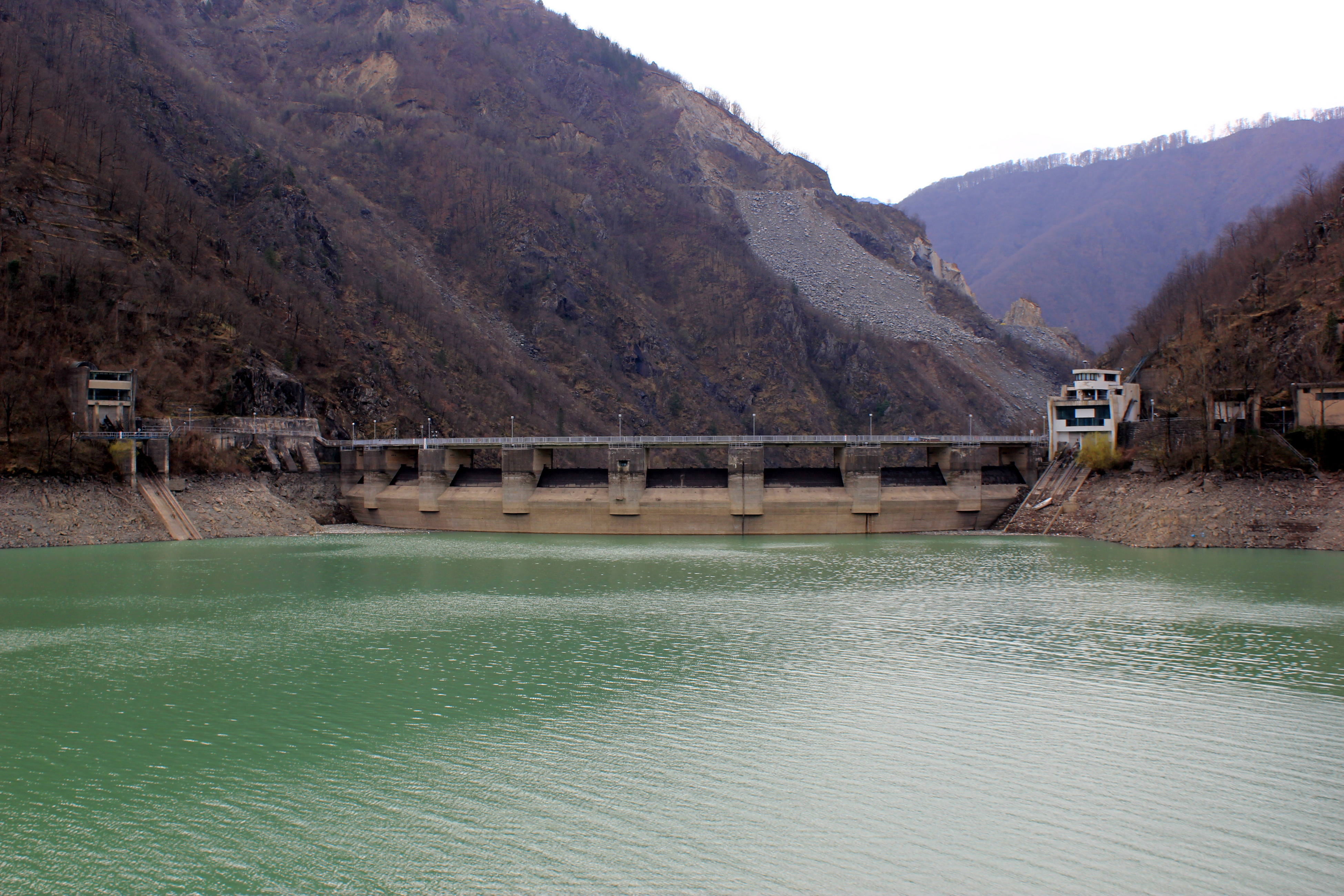 Der Stausee Jablaničko jezero bei Konjic, Bosnien und Herzegowina.